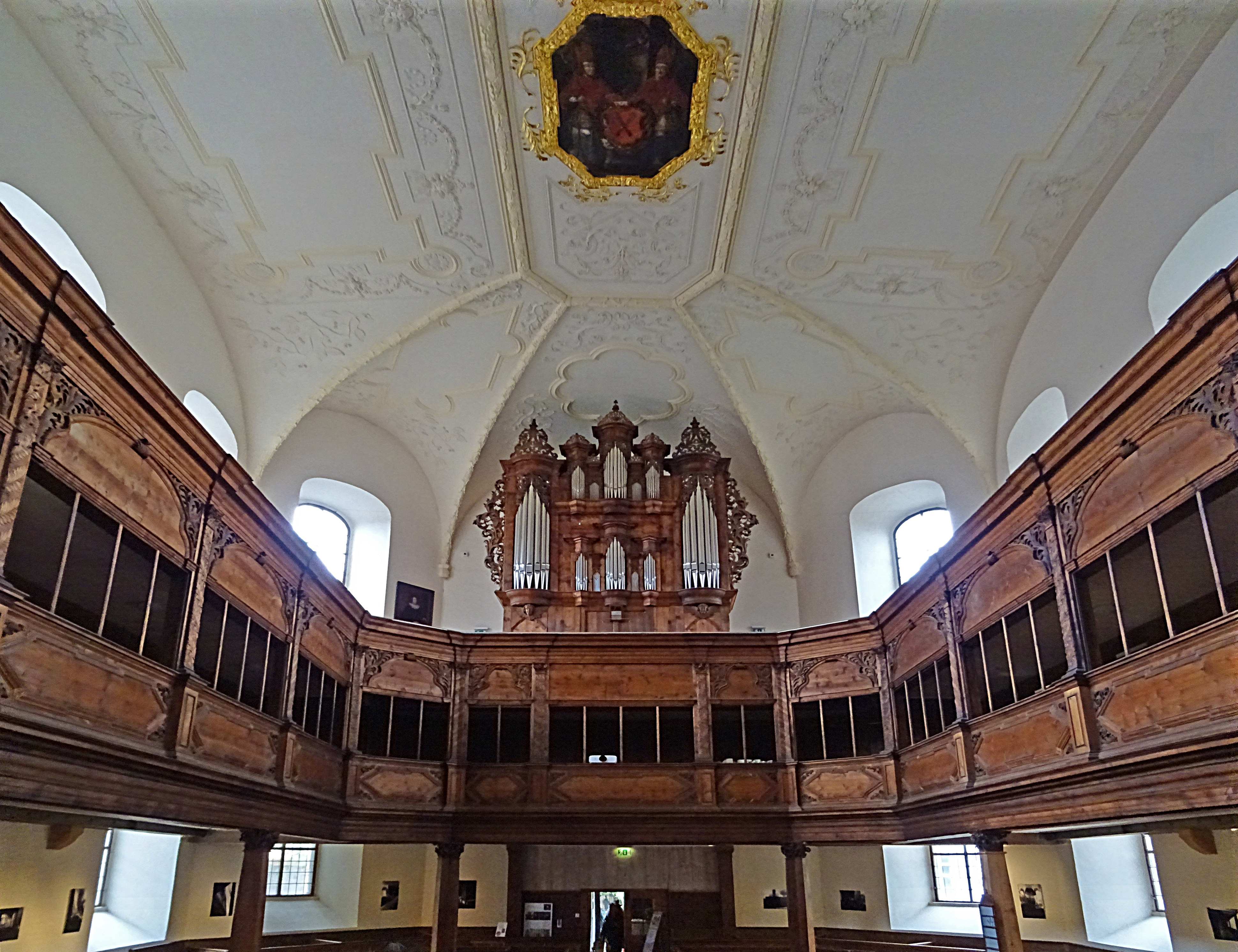 Innenansicht von St. Blasii (Quedlinburg), Blick zur Orgel